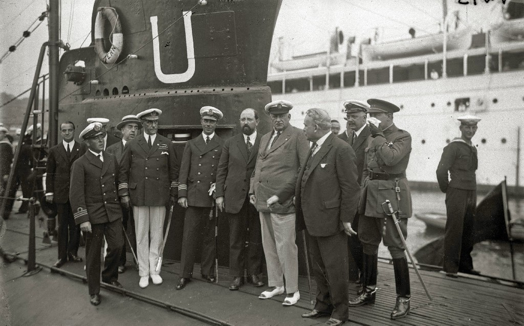 Título original: Visita del general Miguel Primo de Rivera al puerto de Pasaia (1/1) Localización: San Sebastián (Guipúzcoa)